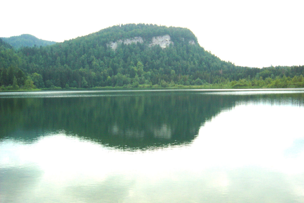 Lac de Bonlieu (Jura -France)